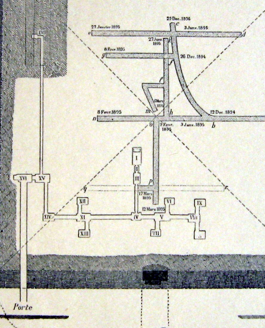 plan du complexe funéraire d'amenemhat III à Dahchour